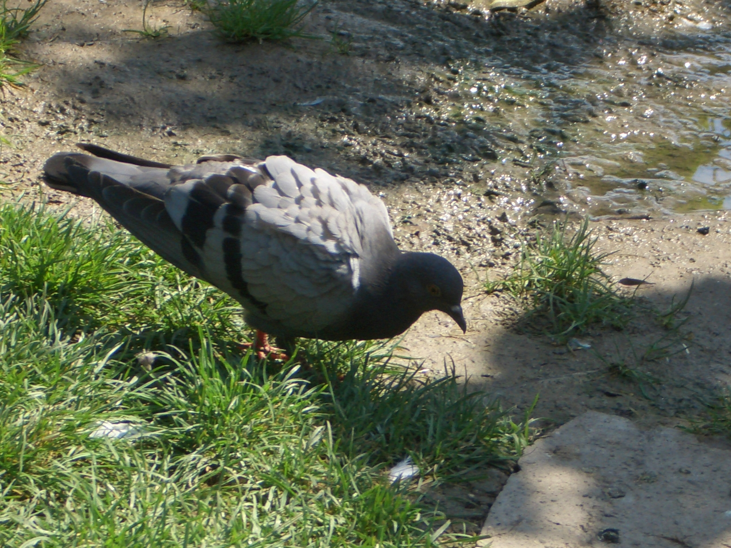 Ankara'da bir güvercin.